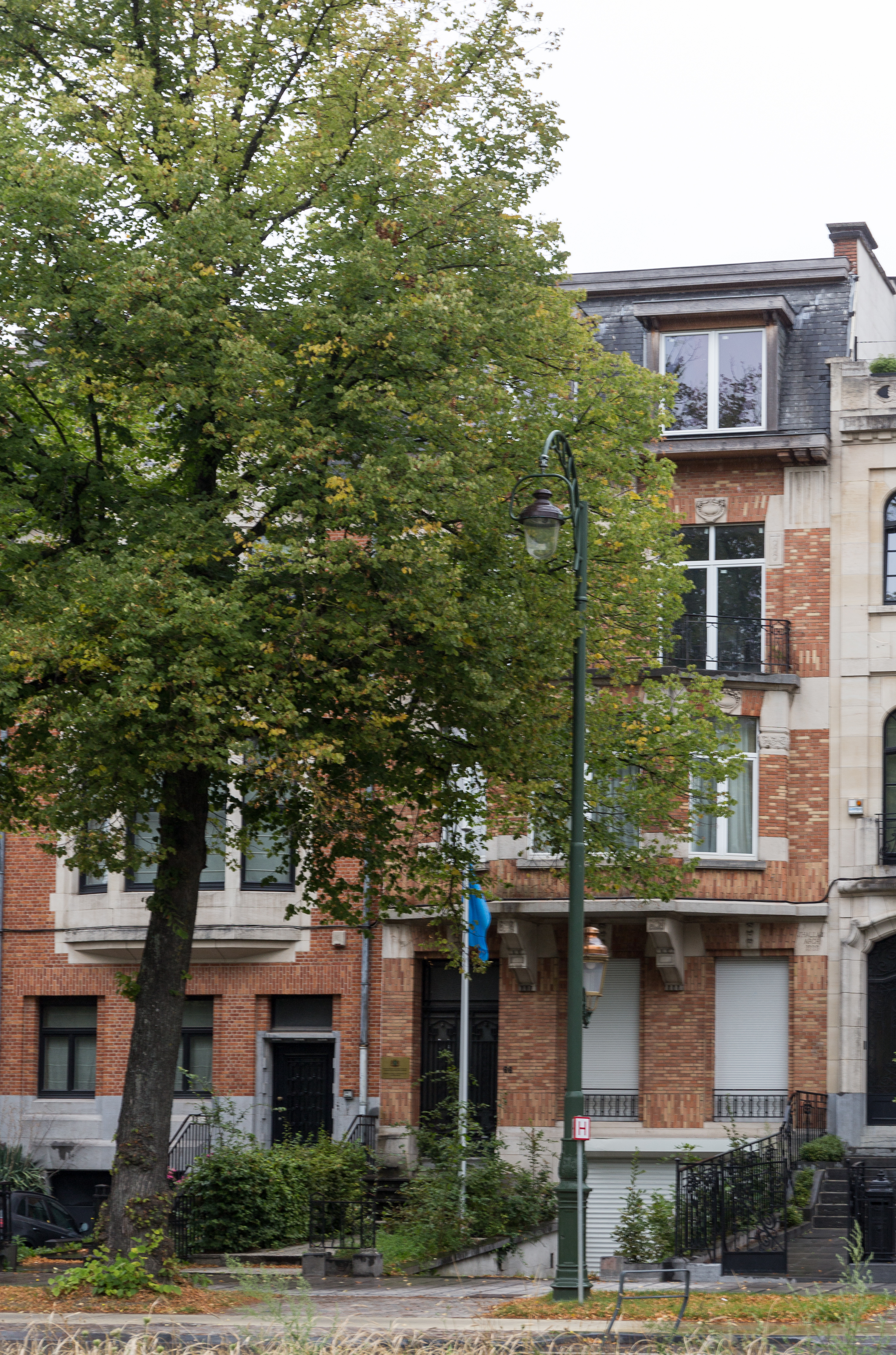 Ambassade de Somalie en Belgique, avenue Franklin Roosevelt 94 à Bruxelles.